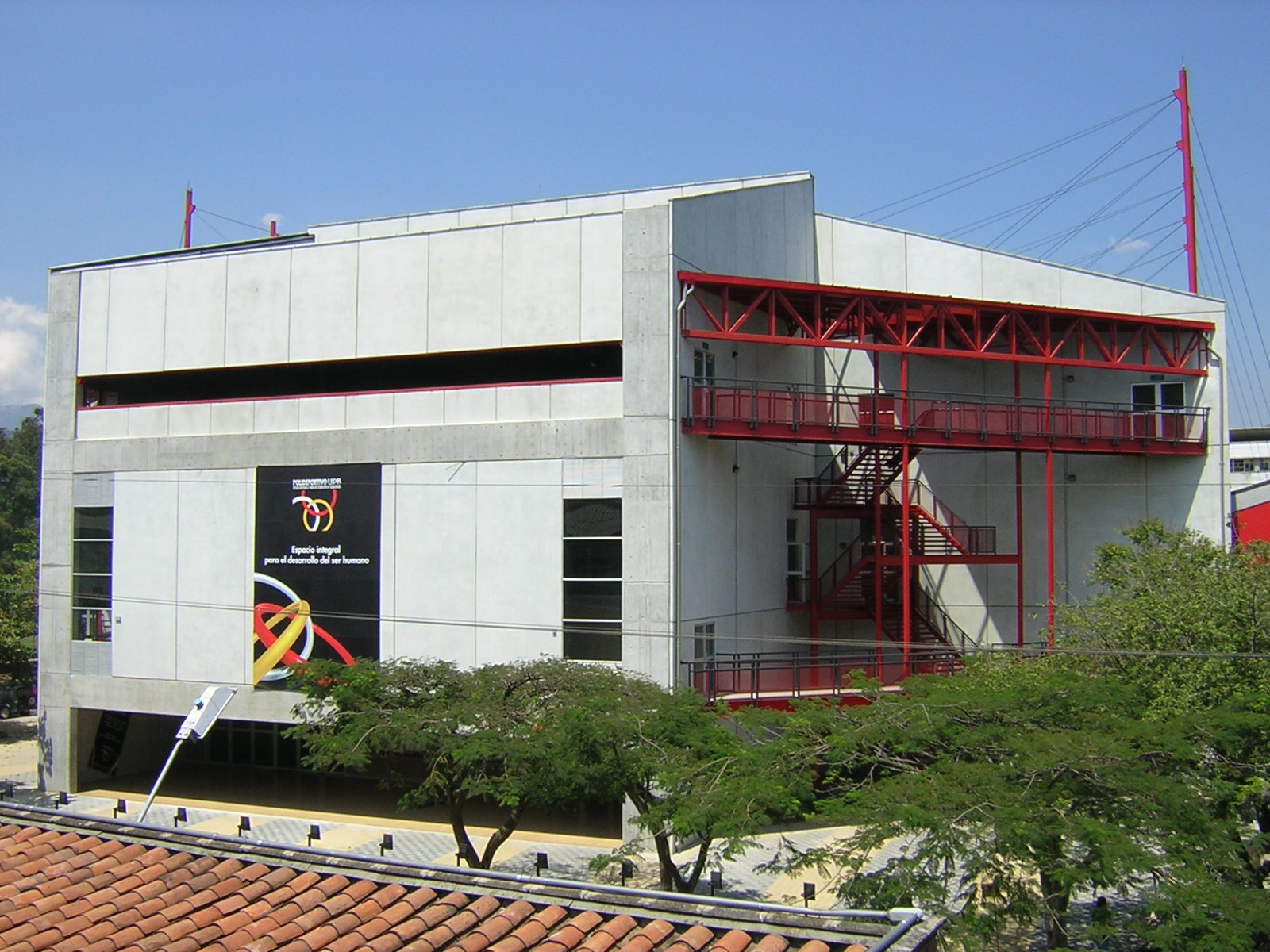 Polideportivo de la Universidad Pontificia Bolivariana, Medellín, Colombia.